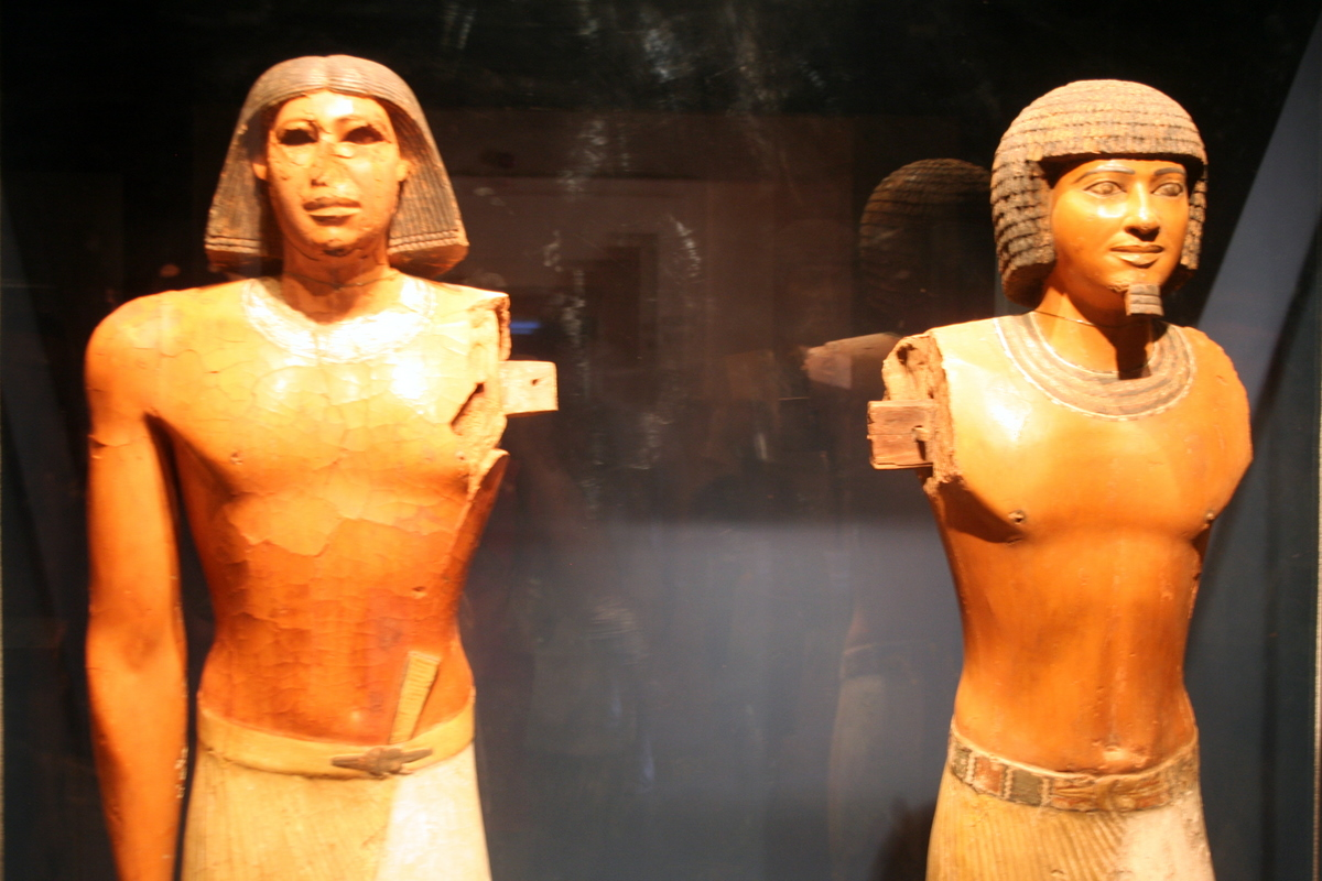 Ptahhotep, vizir du roi Isesi (Ve dynastie), avec deux perruques différentes - Musée Imhotep à Saqqarah